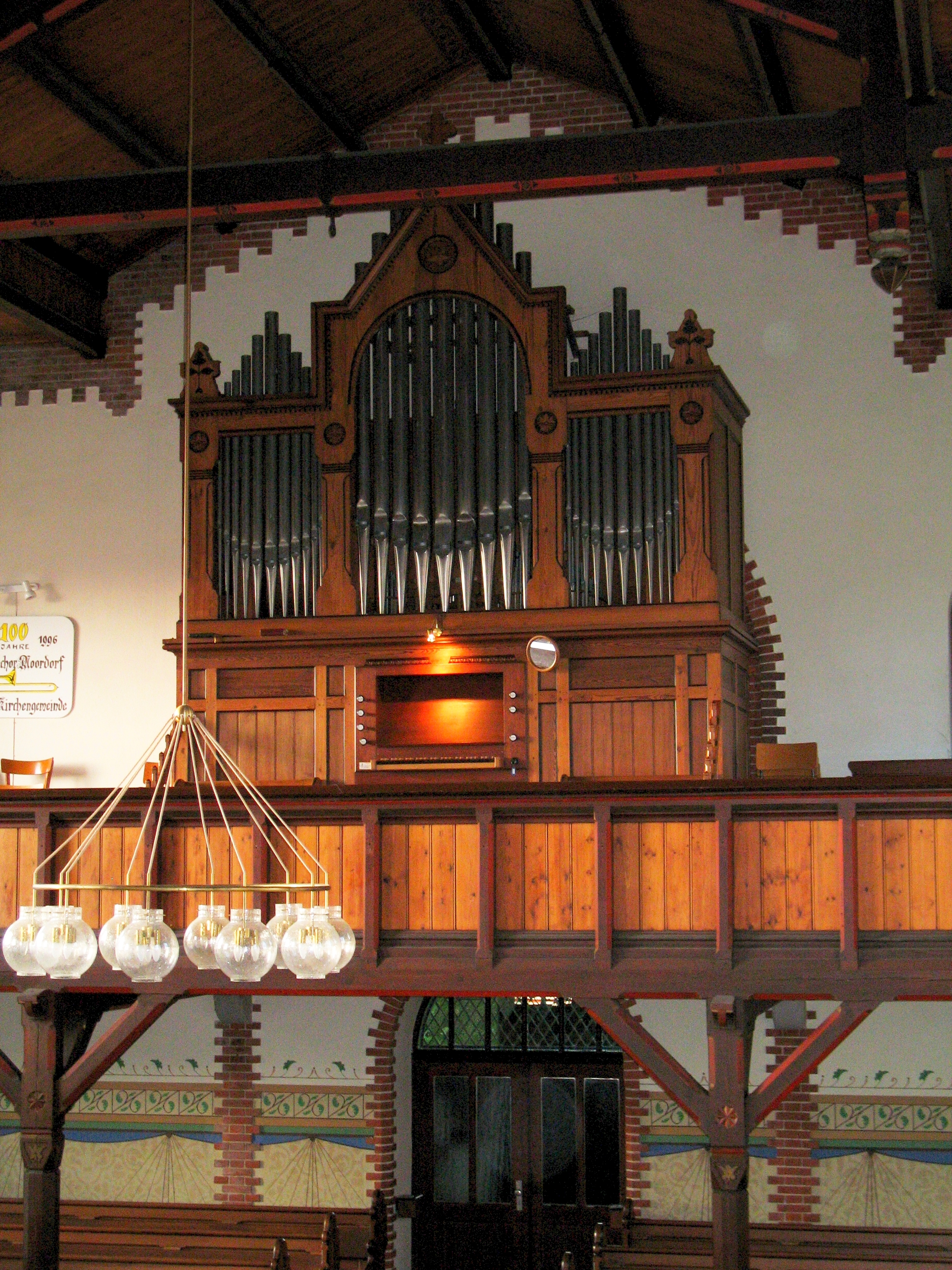 Orgel der Kirche in Moordorf, Ostfriesland